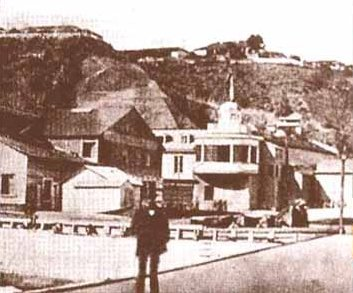 Imagen fotográfica de Valparaíso en 1851. Lo que se ve en la imagen es a un hombre sobre el muelle de la cuidad de ese entonces, mientras que a su espalda se ven la actual plaza Sotomayor, y a la izquierda arriba el cerro alegre.